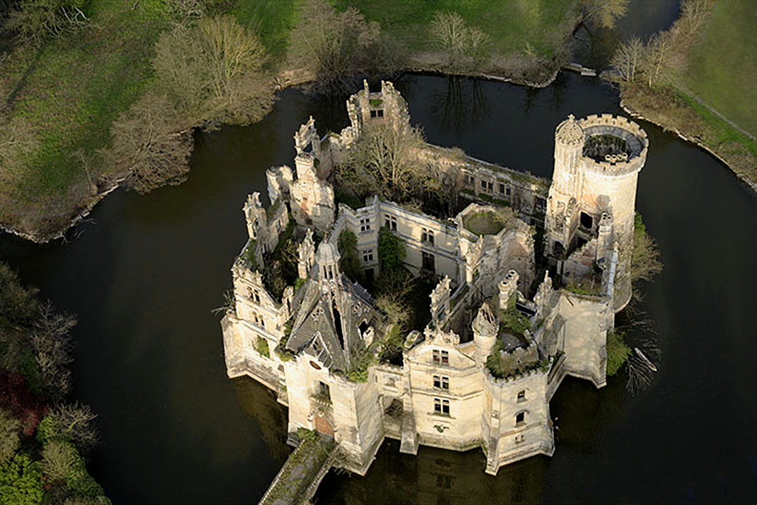 Vue oblique ouest des superbes ruines du Château de La Mothe-Chandeniers.